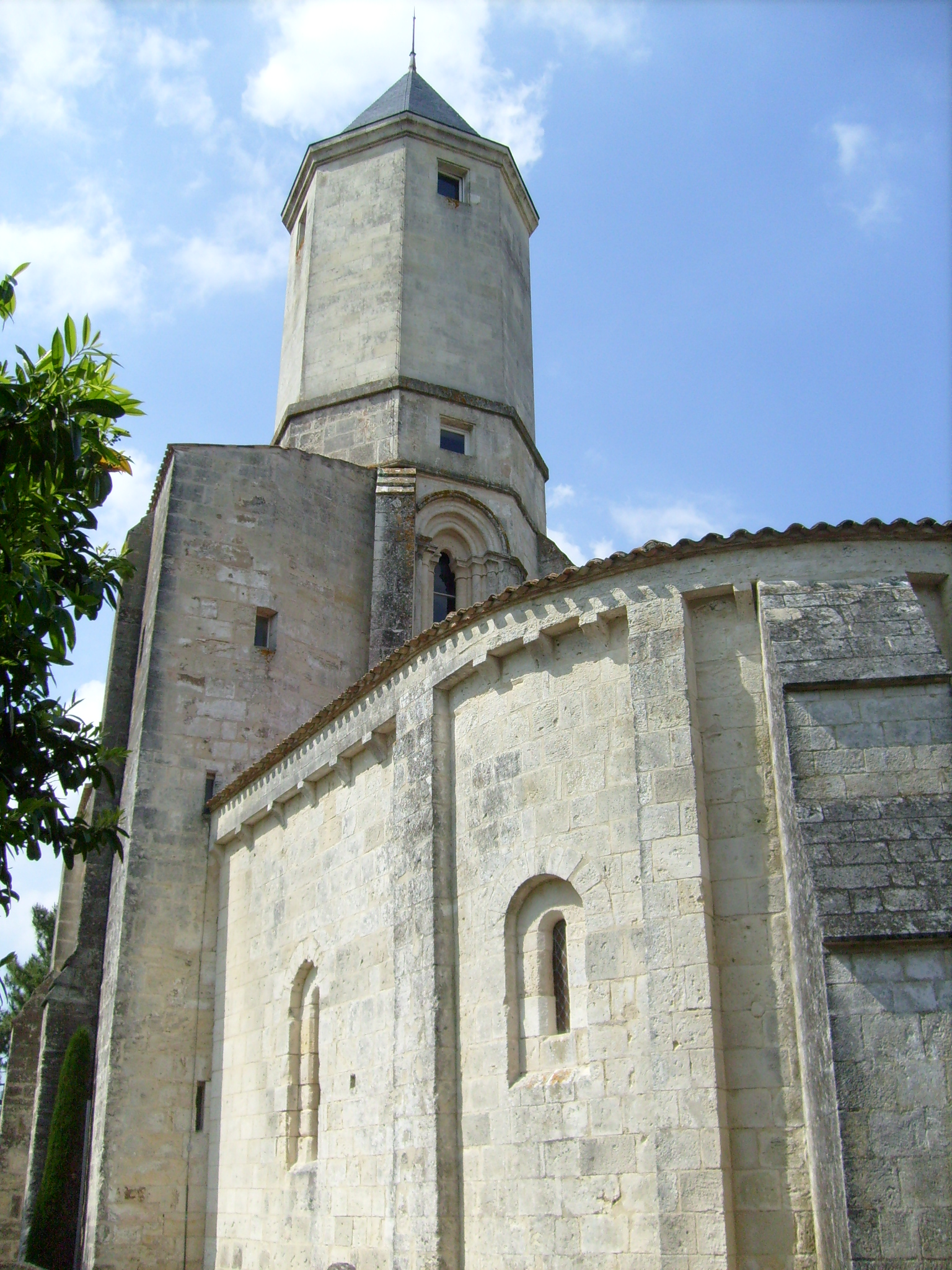 L'ancienne église de Saint-Palais sur mer, Charente-Maritime